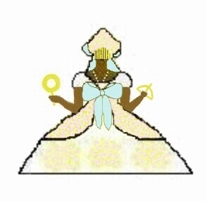 Icone Oxum Candomblé